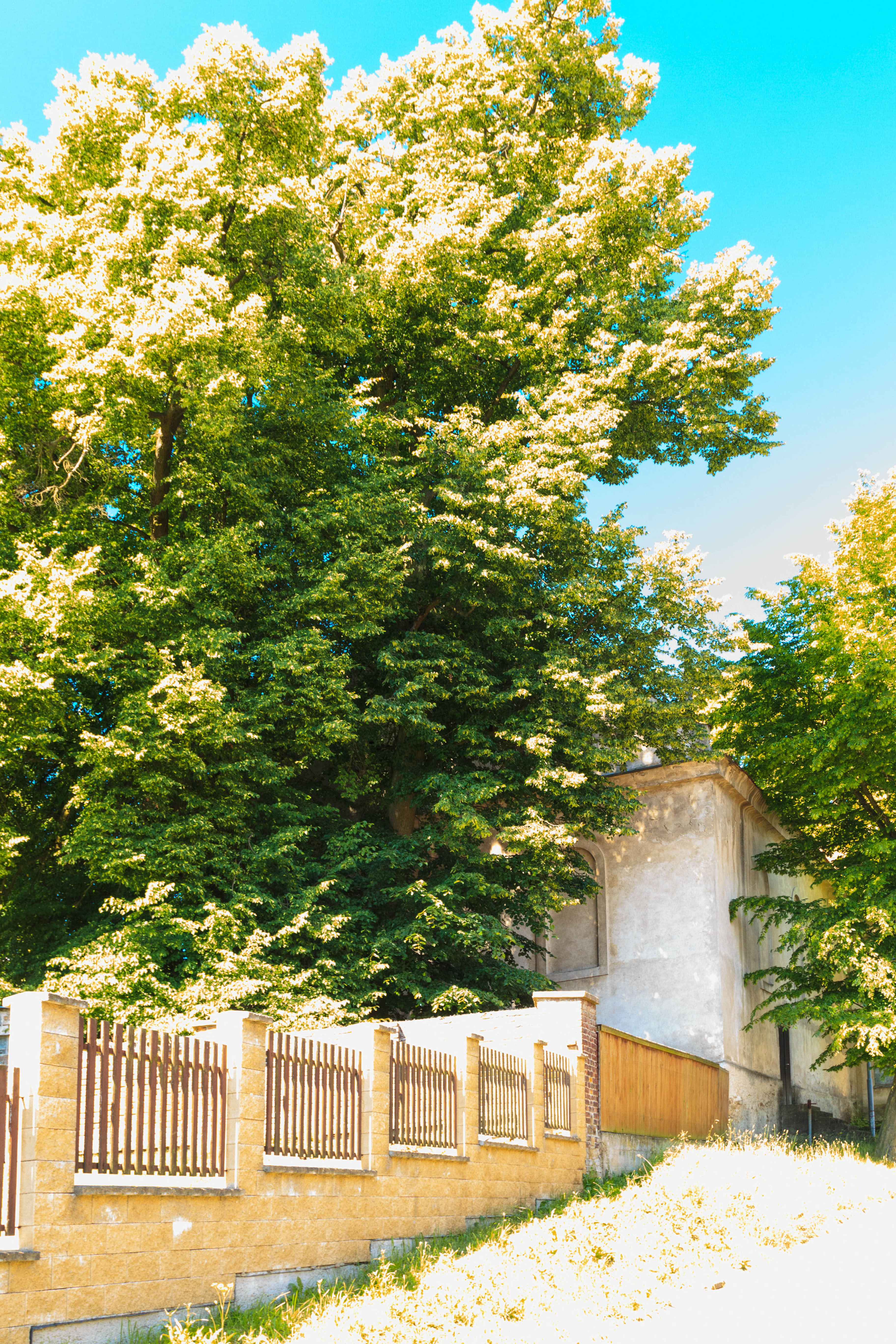 Synagoga v Habrech Project: Židovské památky.